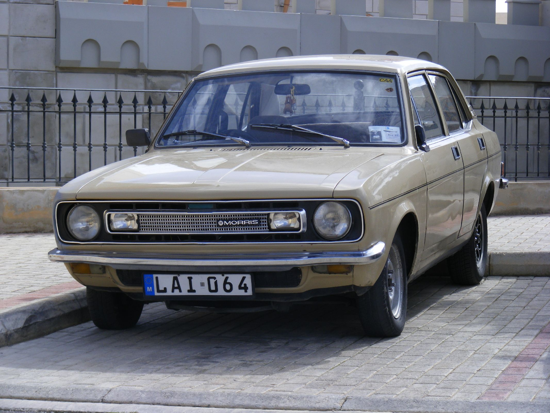 MORRIS MARINA, MALTA